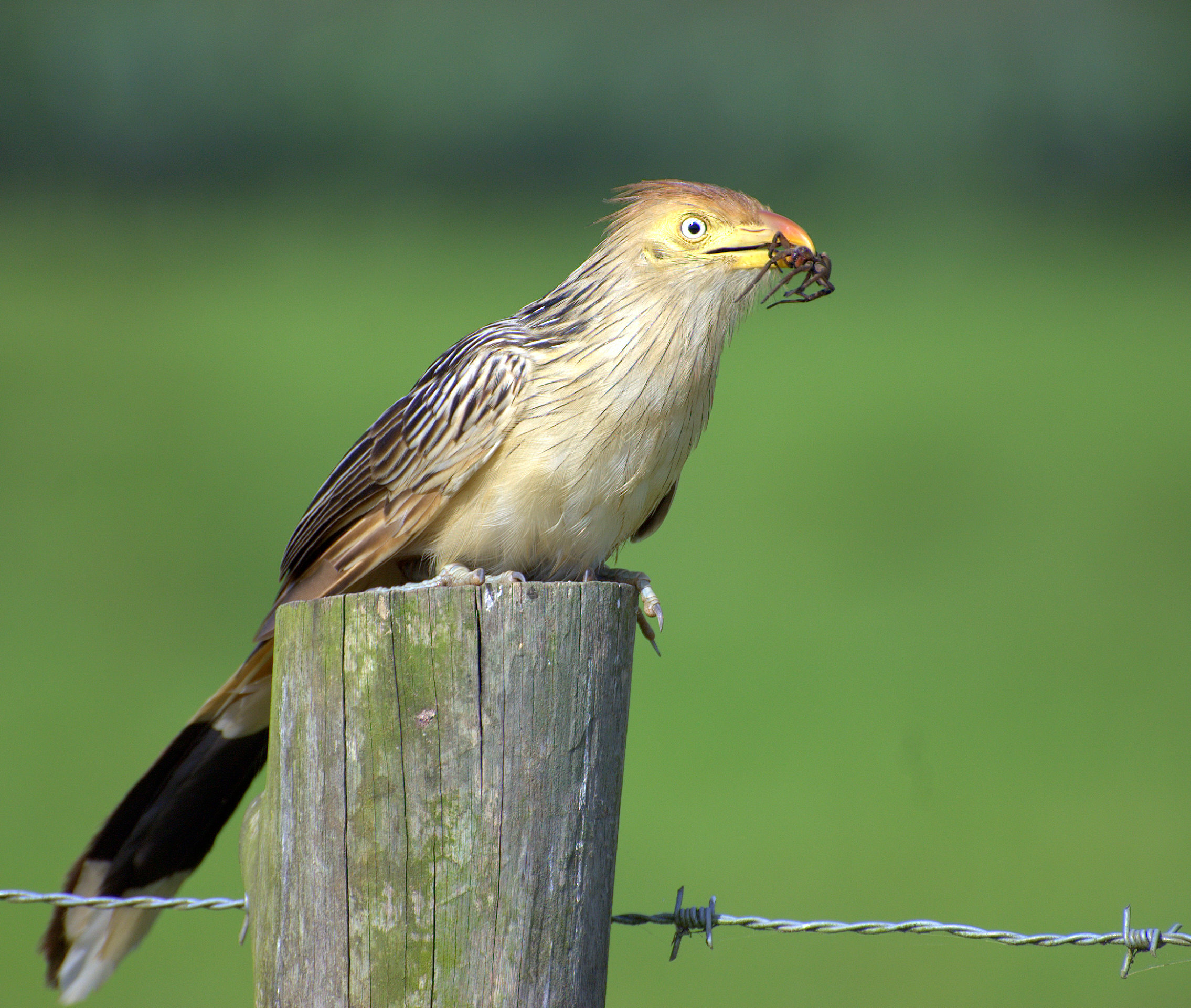 Margem do rio Ribeira de Iguape próximo à cidade de Registro